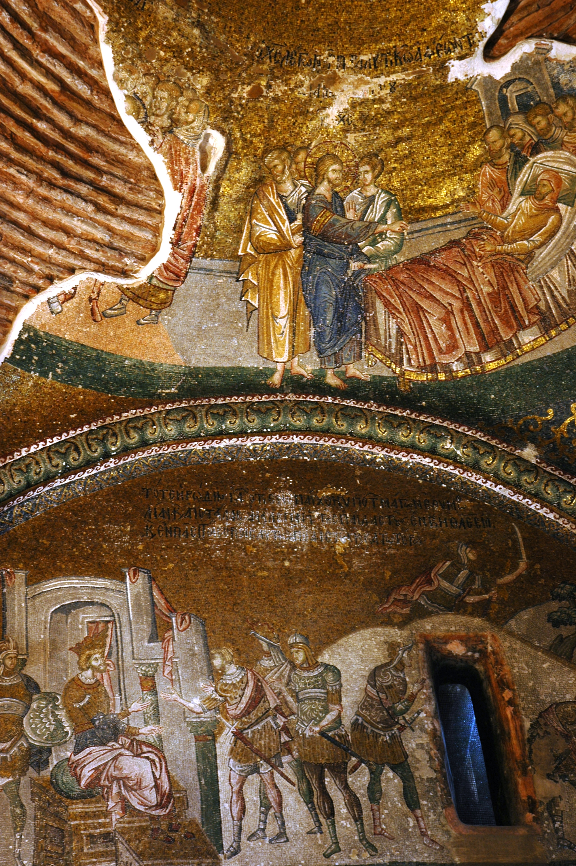 Sant Salvador de Khora - Sostre de la nau